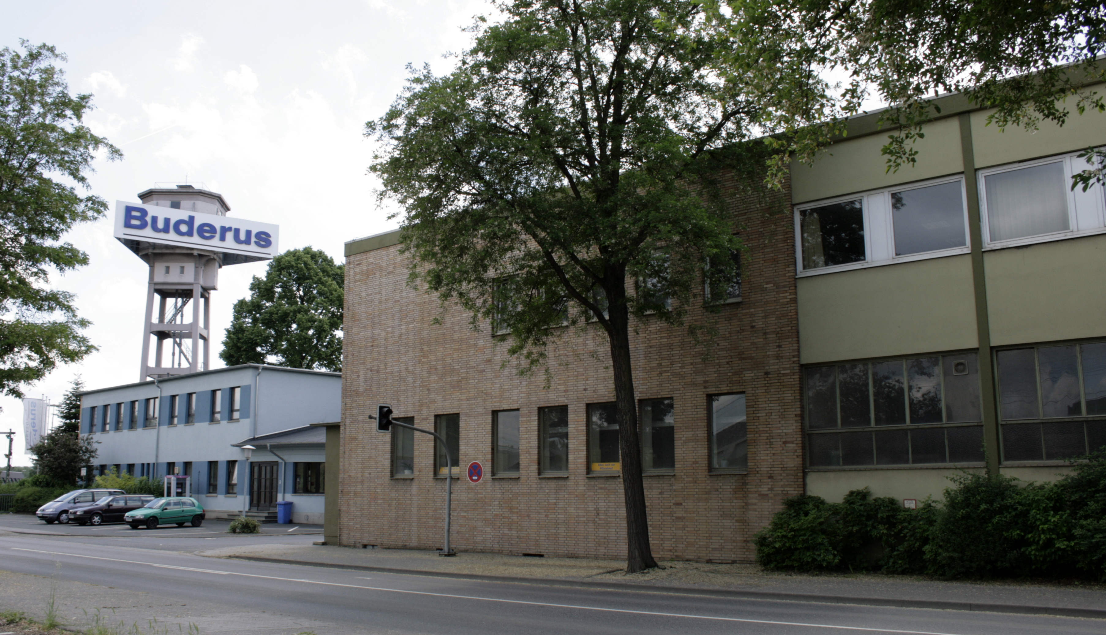 Einfahrt des Buderus-Werks mit Wasserturm in Limburg-Staffel, Deutschland